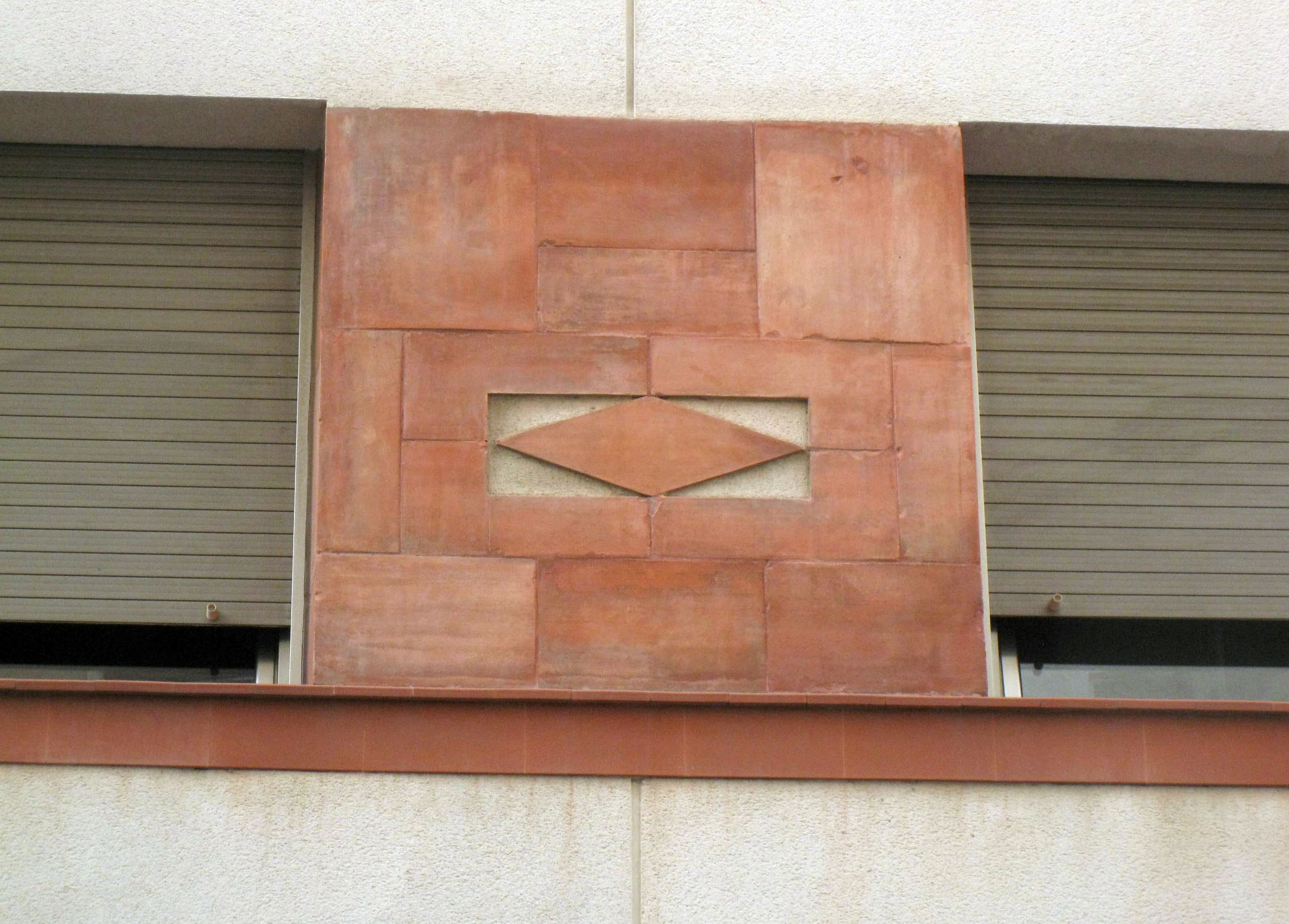 Habitatge al carrer d'Iscle Soler núm. 30, fent cantonada amb la Rambla d'Ègara (Terrassa). L'edifici, d'estil racionalista, és obra de Joan Baca, del 1934. Ha estat modificat i sobremuntat. A la imatge, detall dels ornaments ceràmics de la façana.